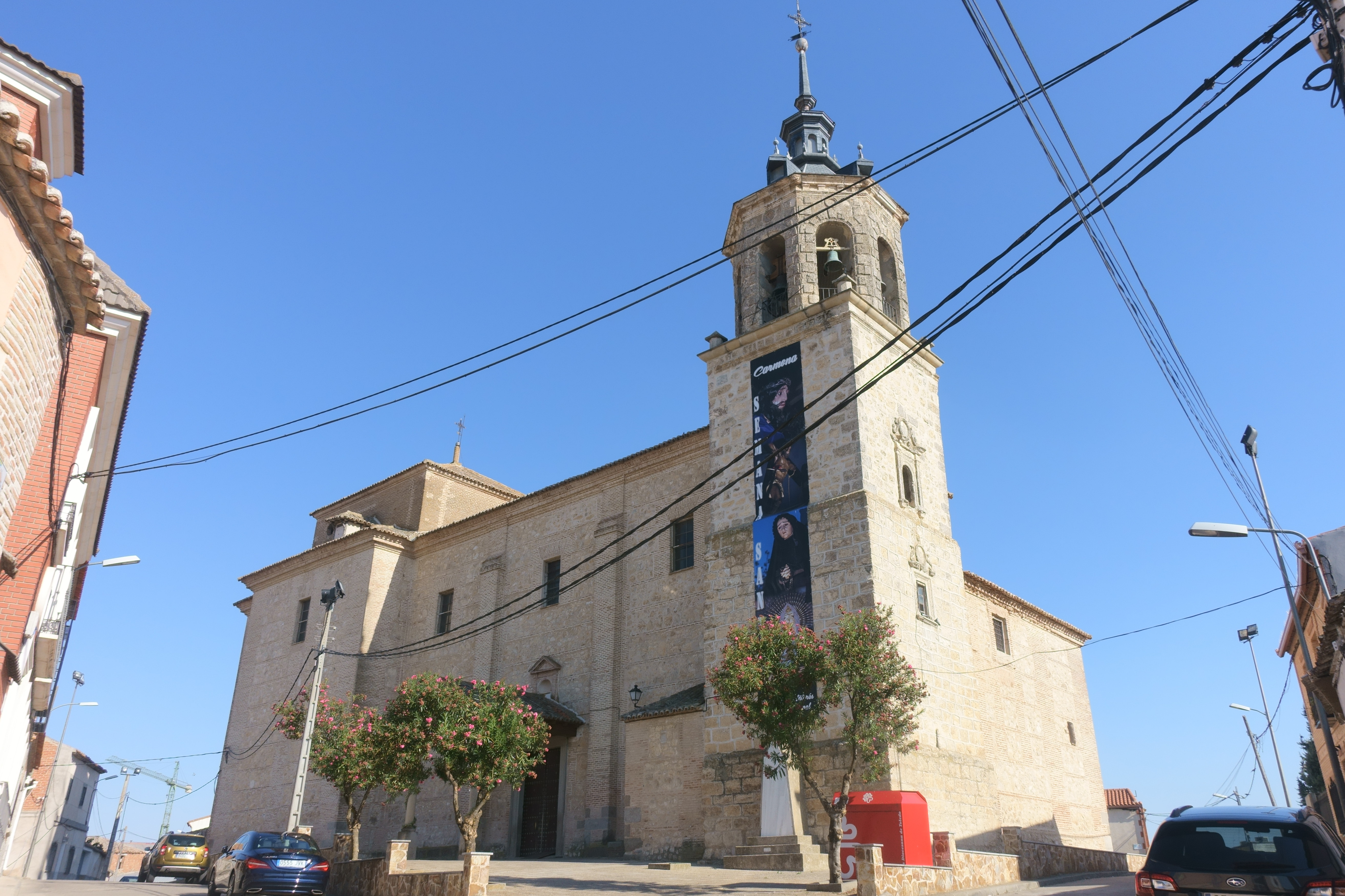 Iglesia de Nuestra Señora de la Asunción, Carmena (Toledo, España)